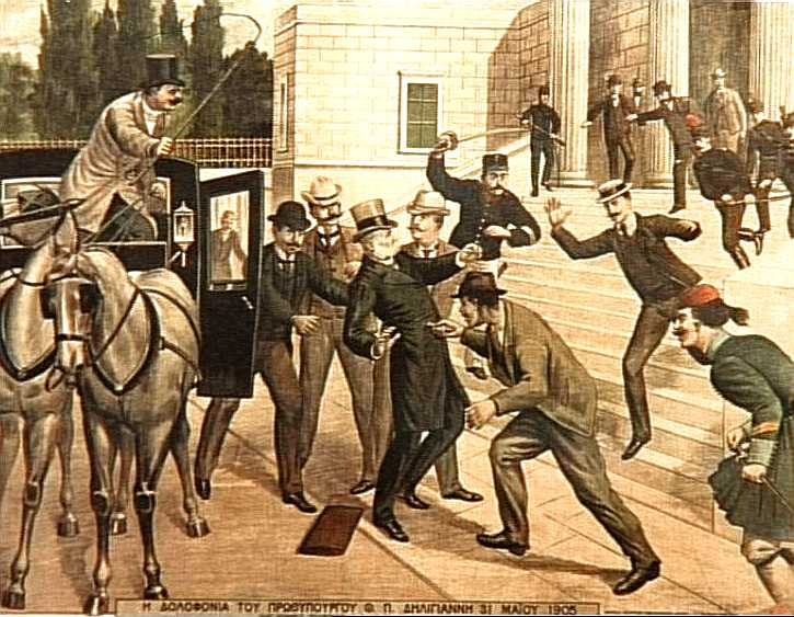 Murder of Deligiannis